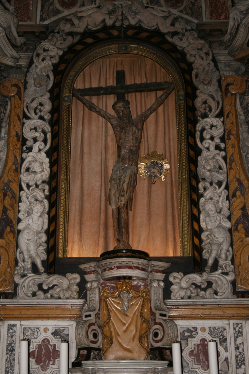 Čudotvorno raspelo u katedrali Sv. Vida u Rijeci